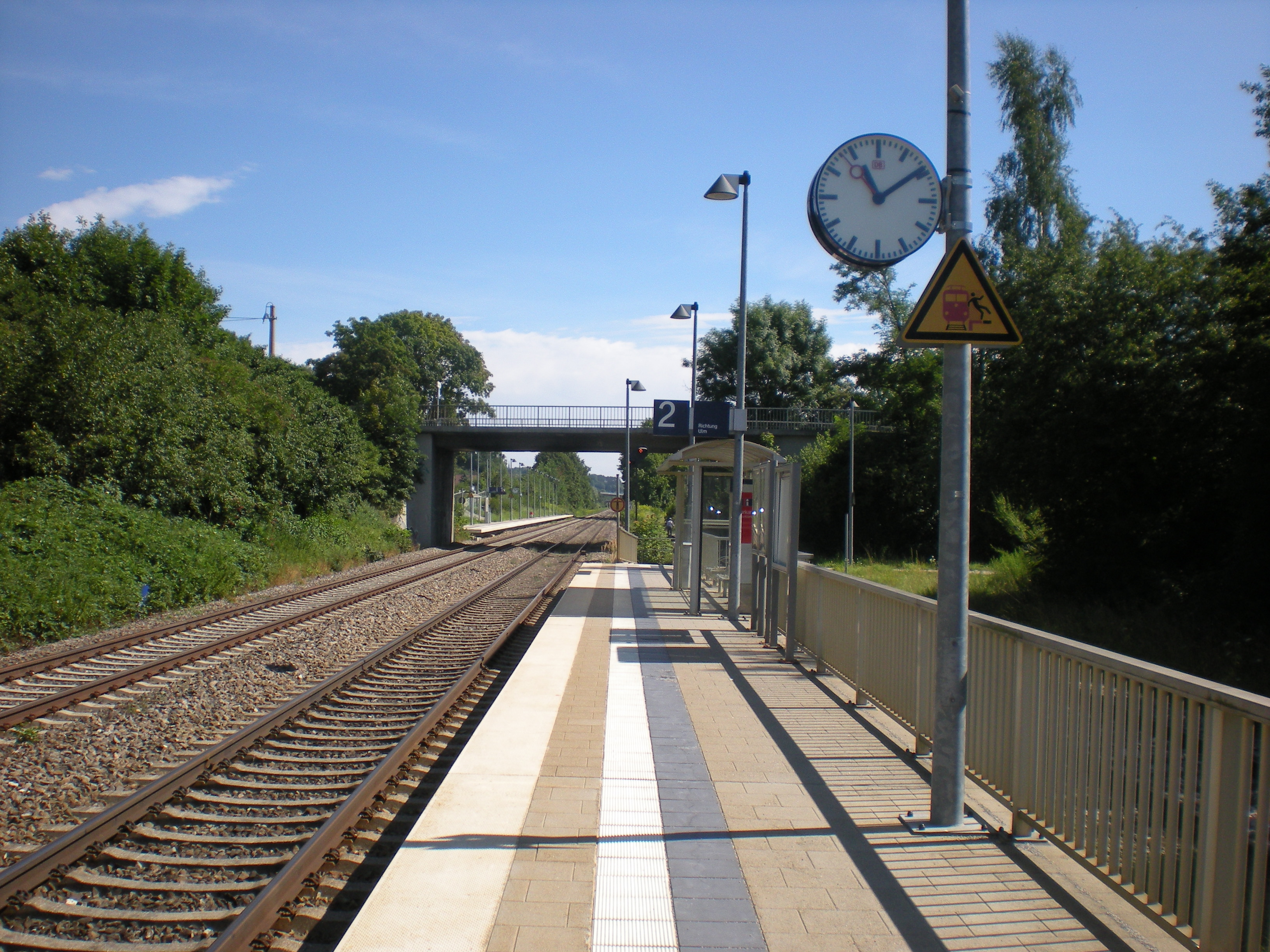 Haltepunkt Ulm-Donautal, Seitenbahnsteig der Züge in Richtung Ulm, im Hintergrund Seitenbahnsteig der Züge in Richtung Biberach (Riß)